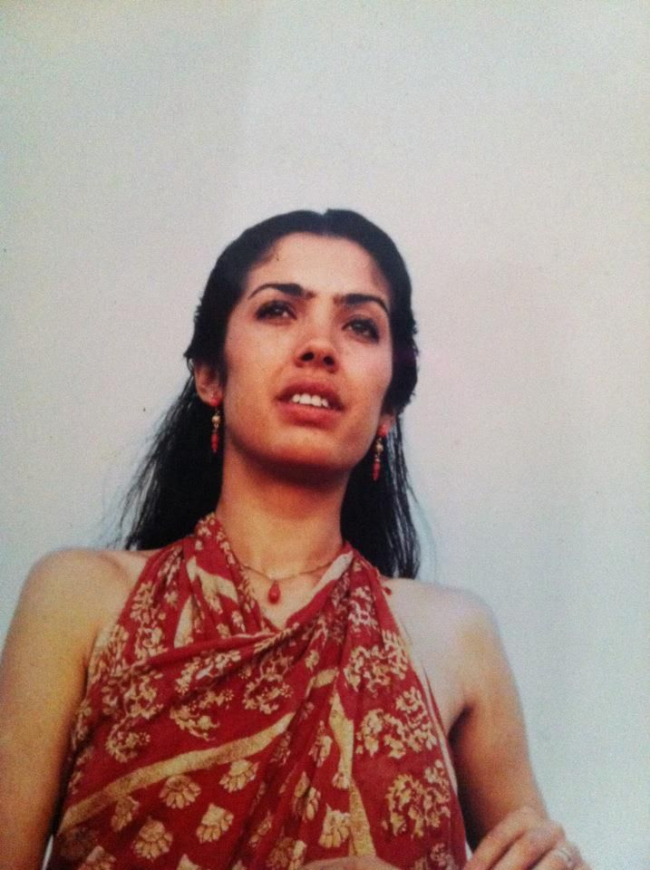 Dolores Montoya ¨Lole¨